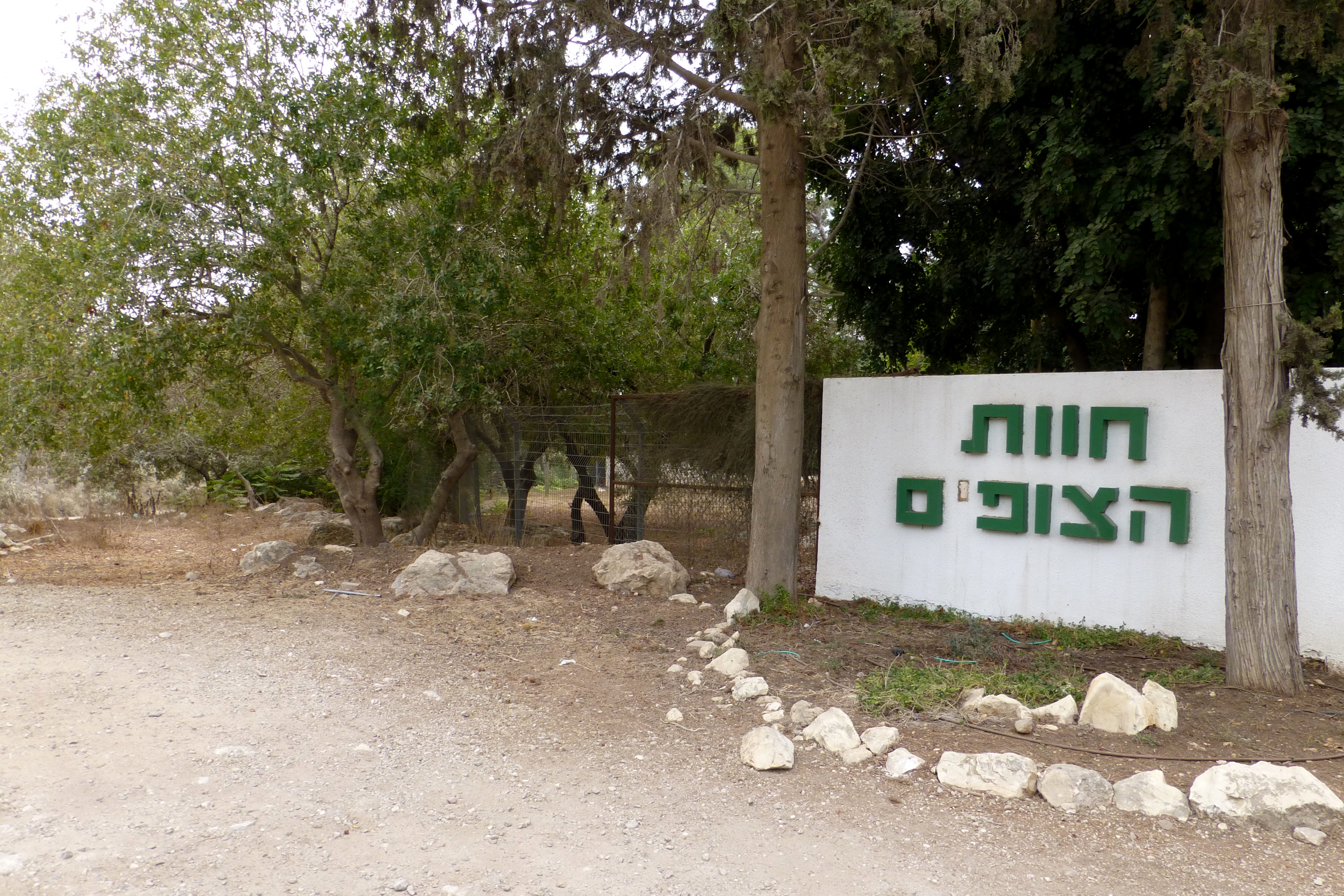 חוות הצופים סמוך לקיבוץ רמת יוחנן